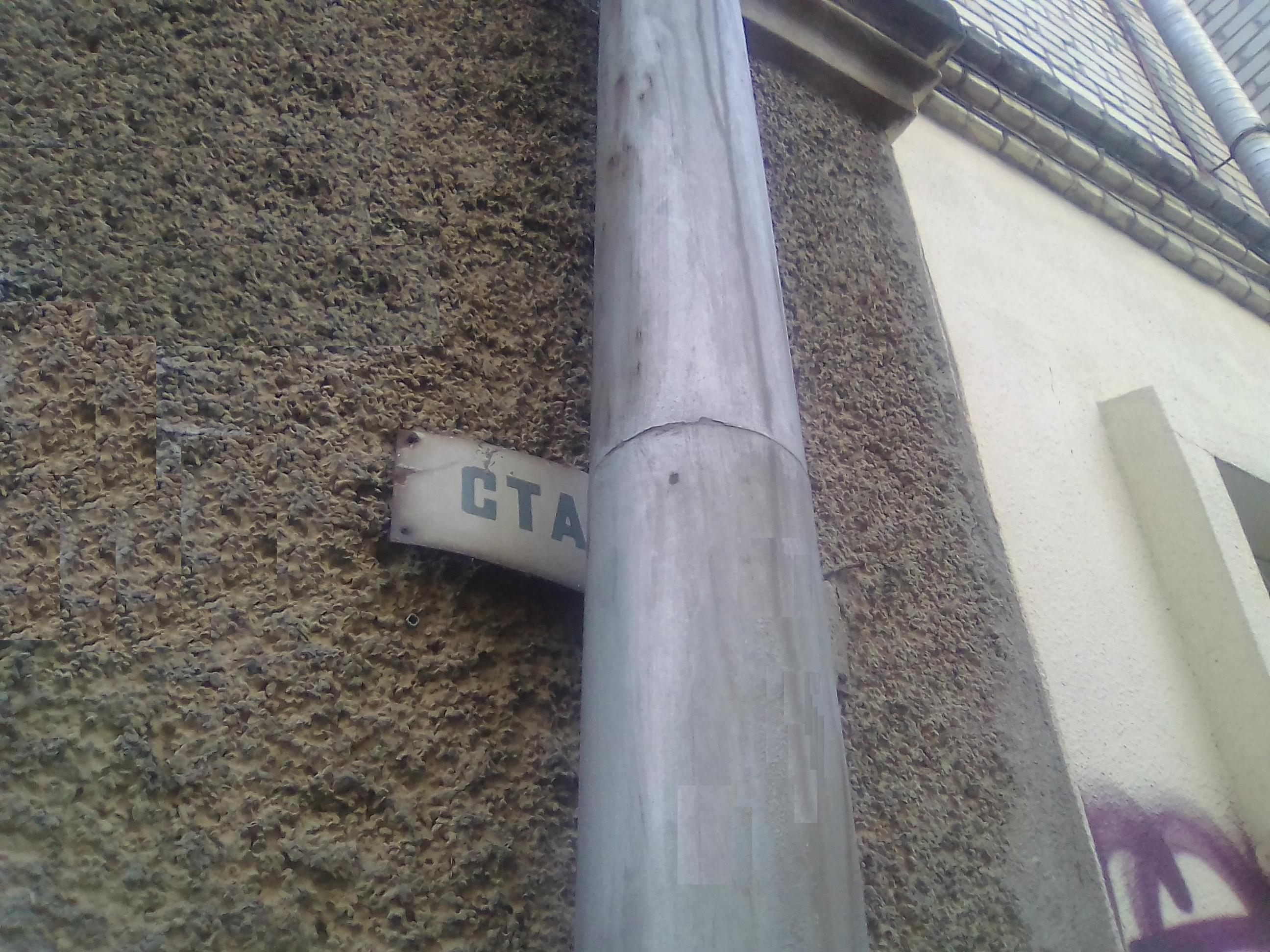 Збільшене зображення лівої частини таблички з колишньою назвою вулиці "Стадіонна" на будинку № 5 по вул. Бузника